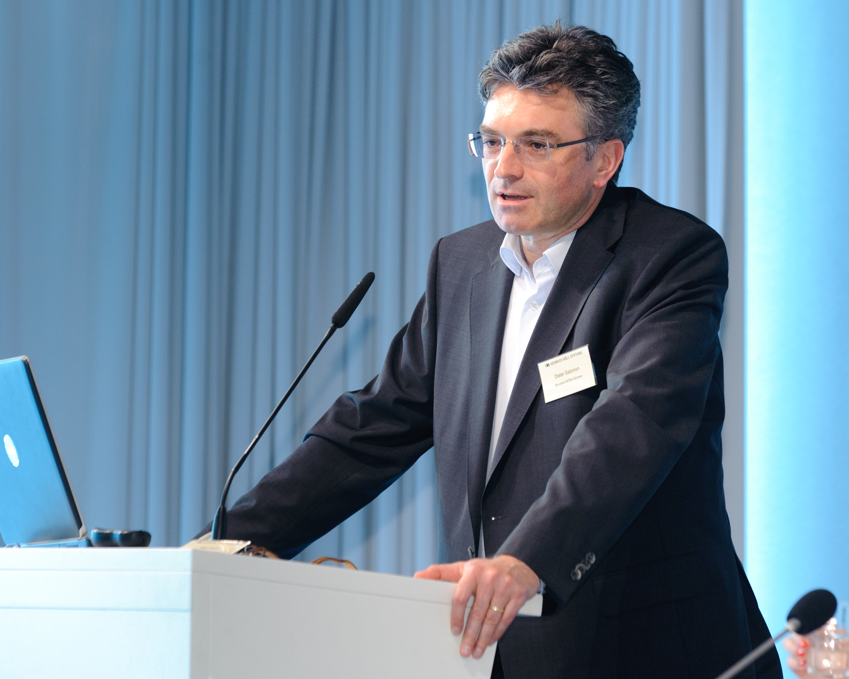 Dieter Salomon (Oberbürgermeister Freiburg i.Br.) Foto: Stephan Röhl